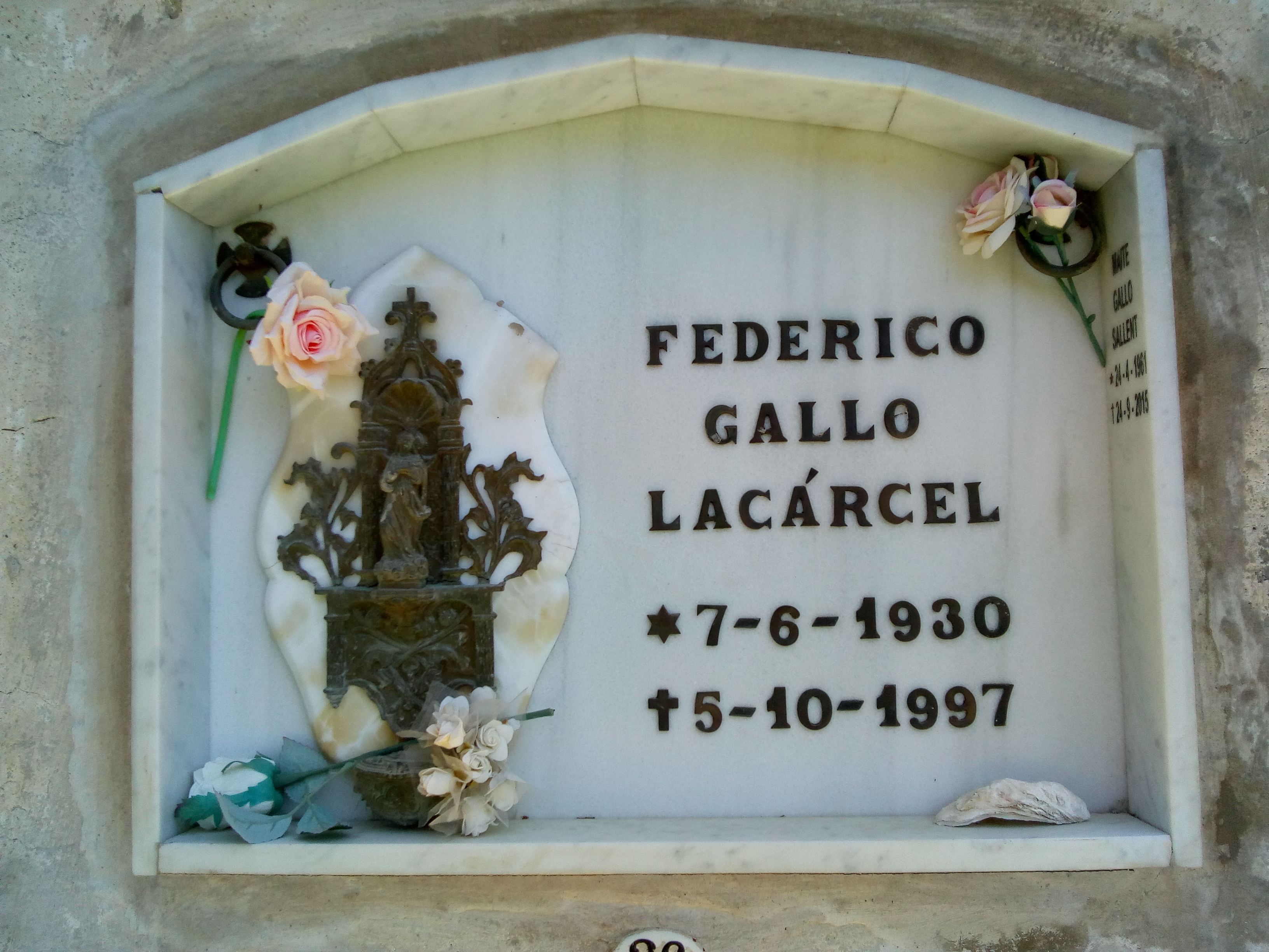 Làpida de Federico Gallo Lacárcel en el cementiri de Sant Quirze Safaja, Moianès, Catalunya.